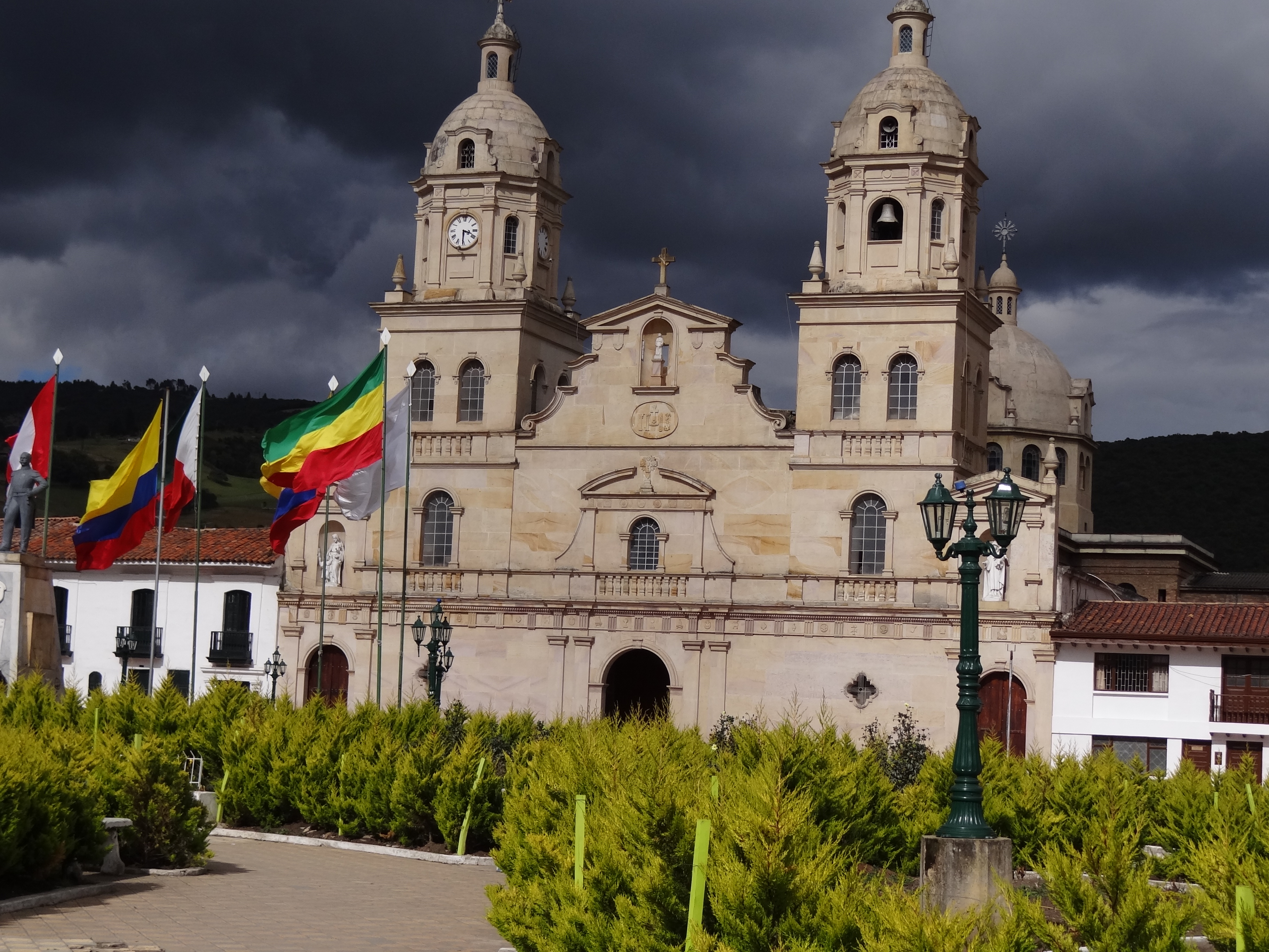 Iglesia católica, municipio de Santa Rosa de Viterbo, departamento de Boyacá, Colombia